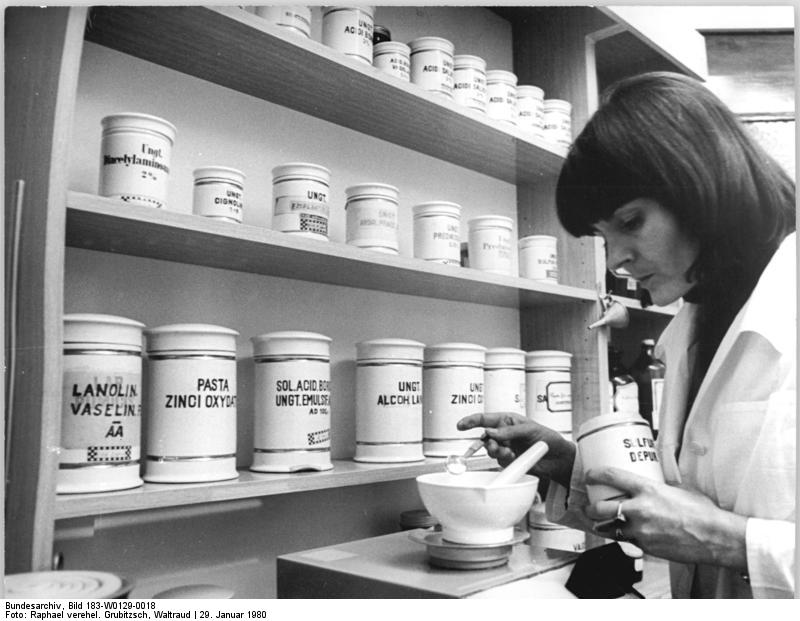 Leipzig, Apothekerin, Rezepturraum ADN-ZB Raphael 29.1.80-se-Leipzig: In derselben Adler-Apotheke, in der Assistentin Ursula Guthke mit modernen Arbeitsmitteln eine Salbenrezeptur zusammenstellt, erlernte vor rund 140 Jahren der Dichter Theodor Fontane den Apothekerberuf. Seit kurzem präsentiert sich die im Jugendstil gehaltene Apotheke in neuer Schönheit in der Leipziger Hainstraße. (siehe 19N,20N)